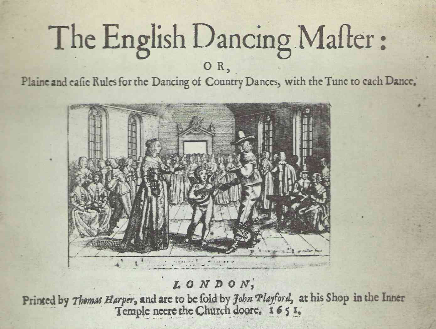 Frontispice de The English Dancing Master